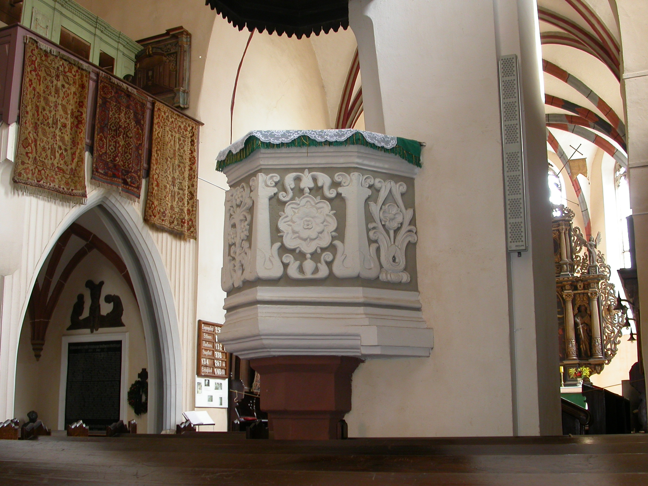 Biserica fostei mănăstiri dominicane, azi biserică evanghelică, sec. XIII,1492 - 1508, 1678, 1804, 1886